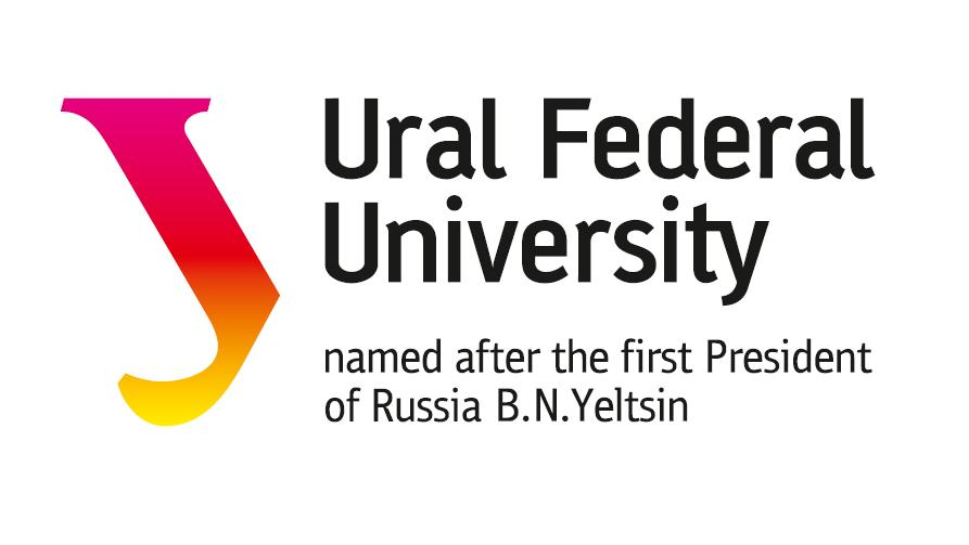 Лого УрФУ